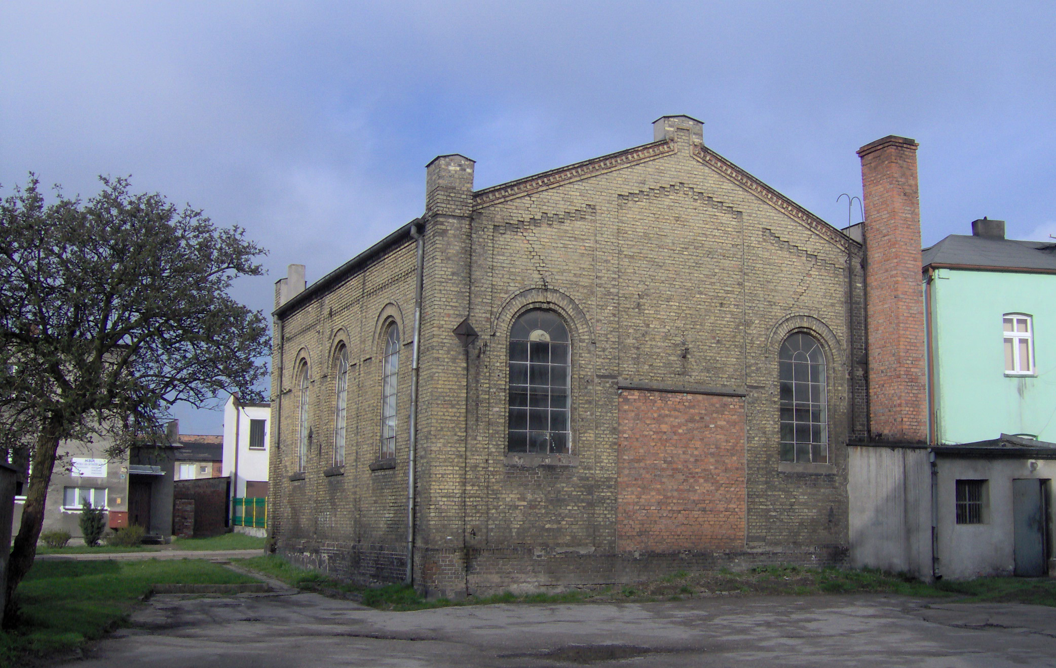 Synagoga w Gniewkowie Synagogue in Gniewkowo